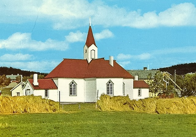 Karasjok gamle kirke